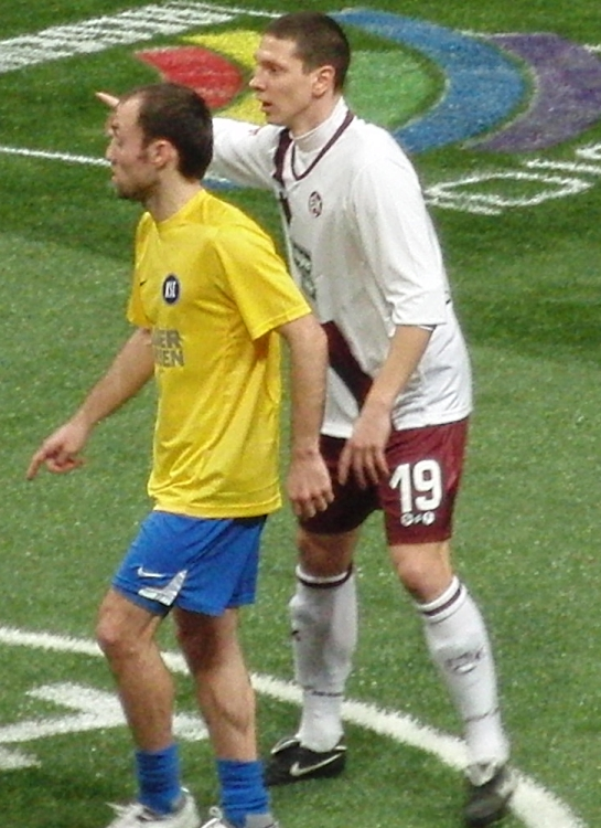 Jiri Bilek und Alexander Iashvili beim Harder-Cup in Mannheim am 2. Januar 2011